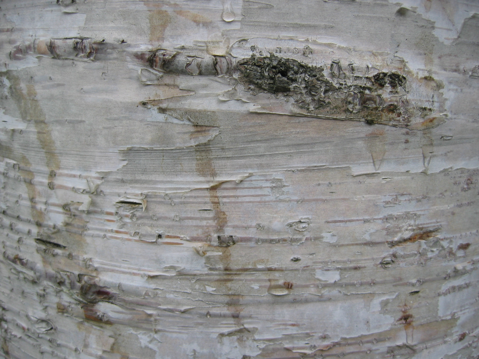 シラカンバ (学名:Betula platyphylla var. japonica)